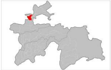 Тоҷикӣ: Ҷойгиршавии географии ноҳияи Истаравшан дар харитаи Ҷумҳурии Тоҷикистон